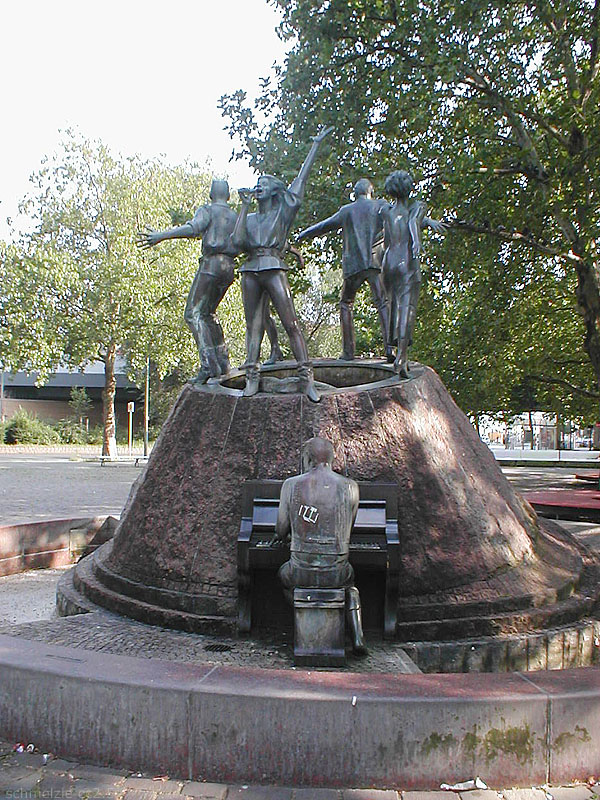 Skulpturenbrunnen Tanz auf dem Vulkan von Ludmilla Seefried-Matejkowa 1988, auf dem Nettelbeckplatz in Berlin-Wedding